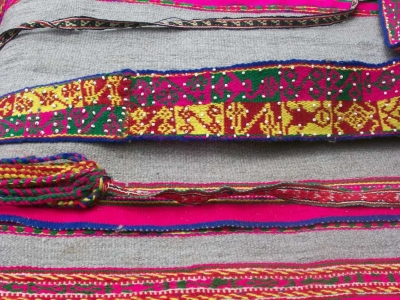 Textilería fina hechos a mano en Tapay.